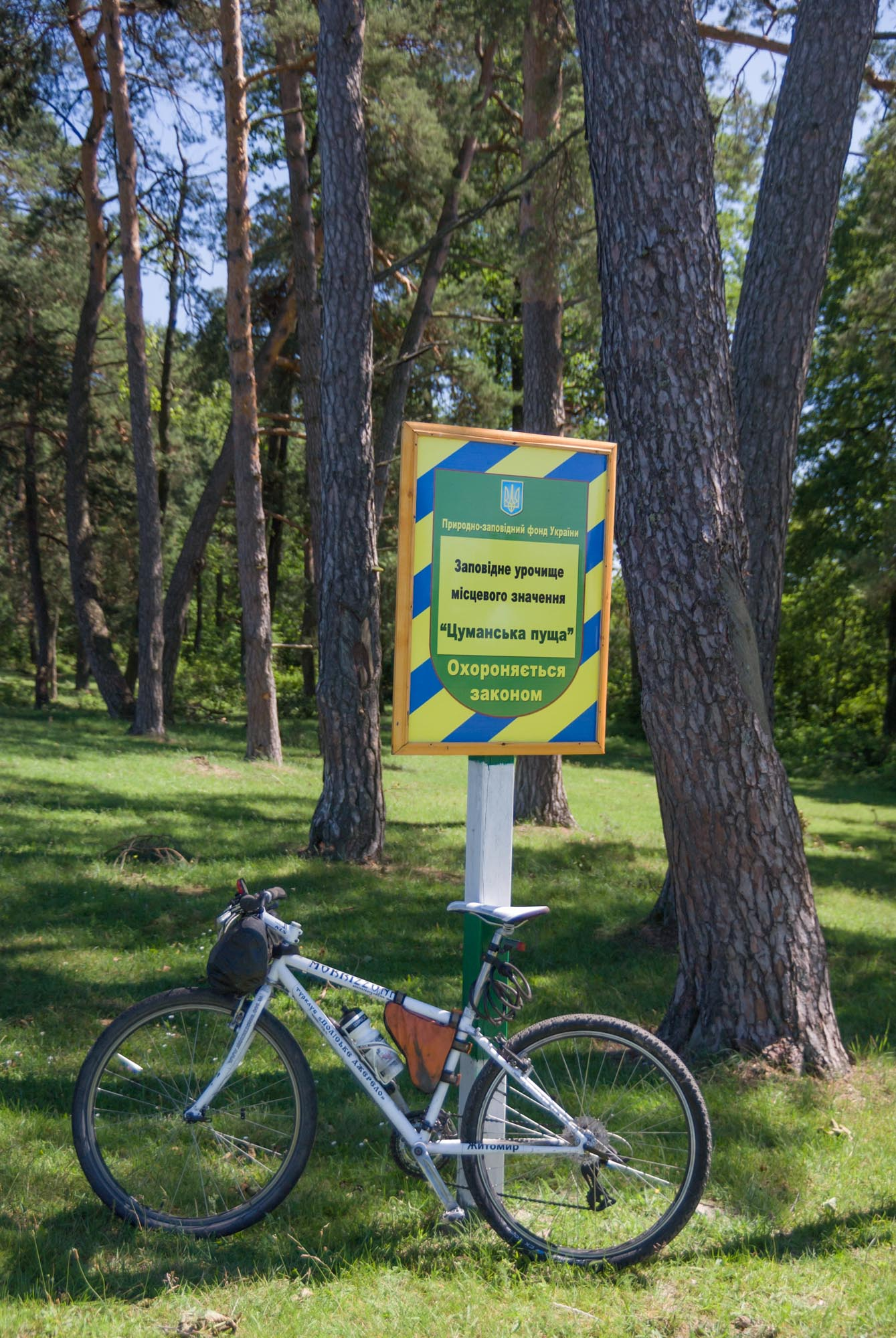 «Цуманська пуща», Ківерцівський р-н, ДП «Цуманське ЛГ»